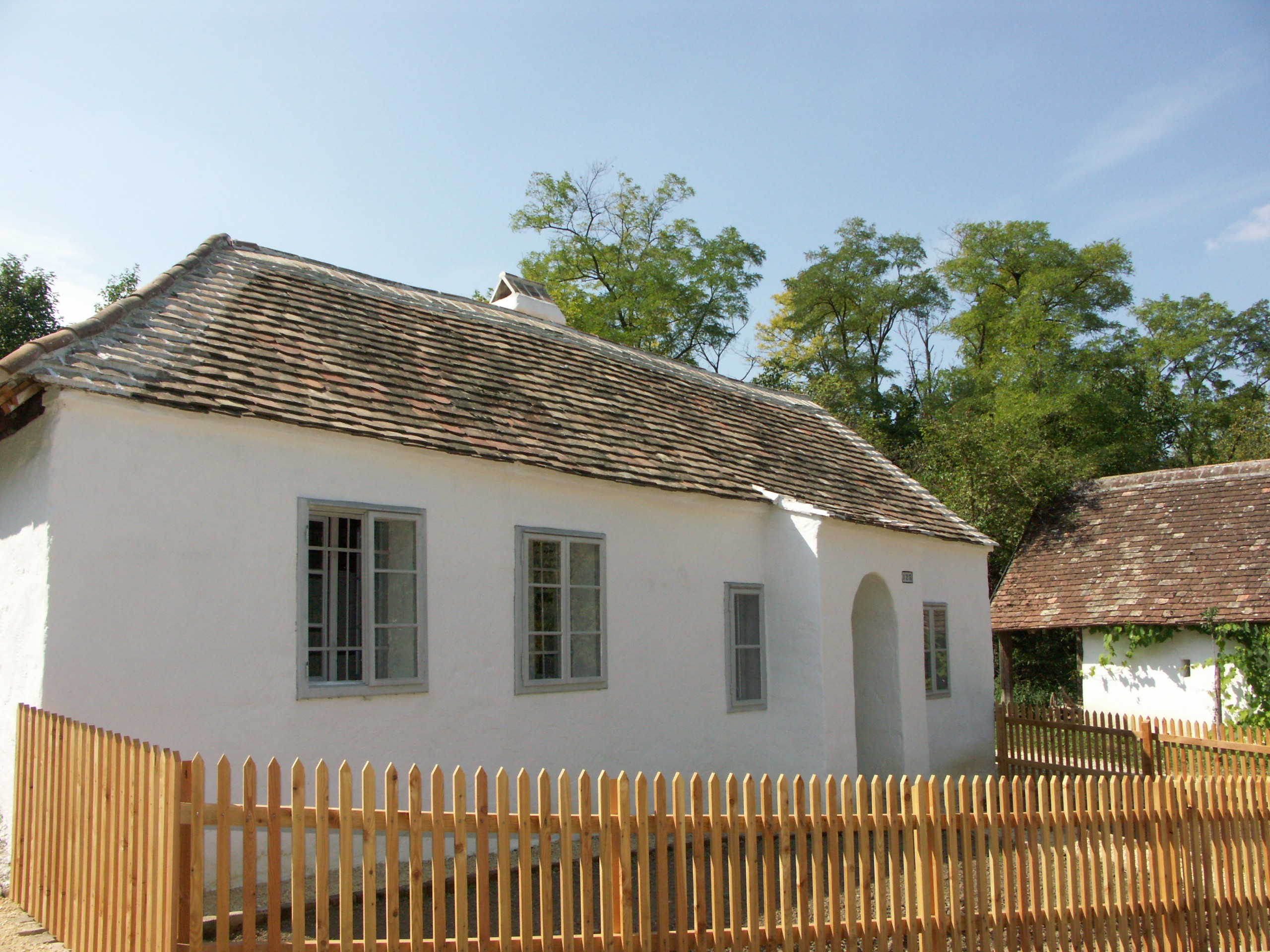 Das Kleinhäuslerhaus aus Wilfersdorf wurde am 5. Oktober im Museumsdorf Niedersulz eröffnet. Es beherbergt die erste ständige Ausstellung über die Geschichte der Hutterer und ihre Spuren im Weinviertel und Südmähren.